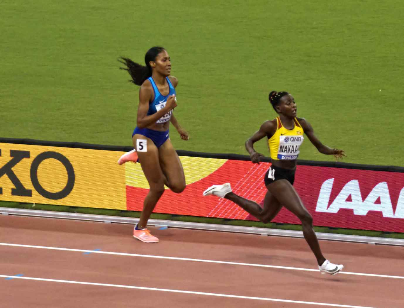 DOH40227 800m women final nakaayi